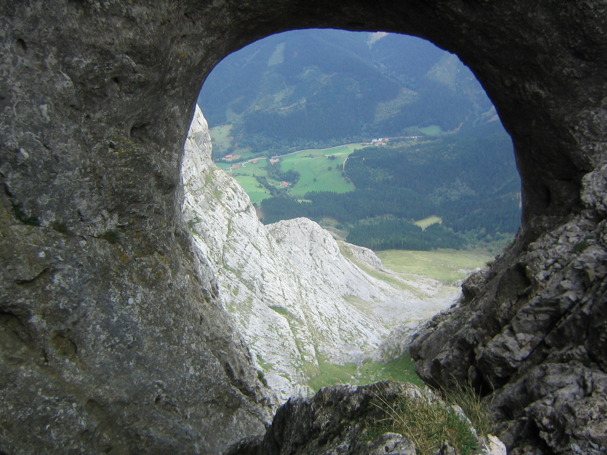 Anboto, Anboto, ojo Bentanetan. Sierra del Anboto (Duranguesado)Vizcaya, País Vasco, España.